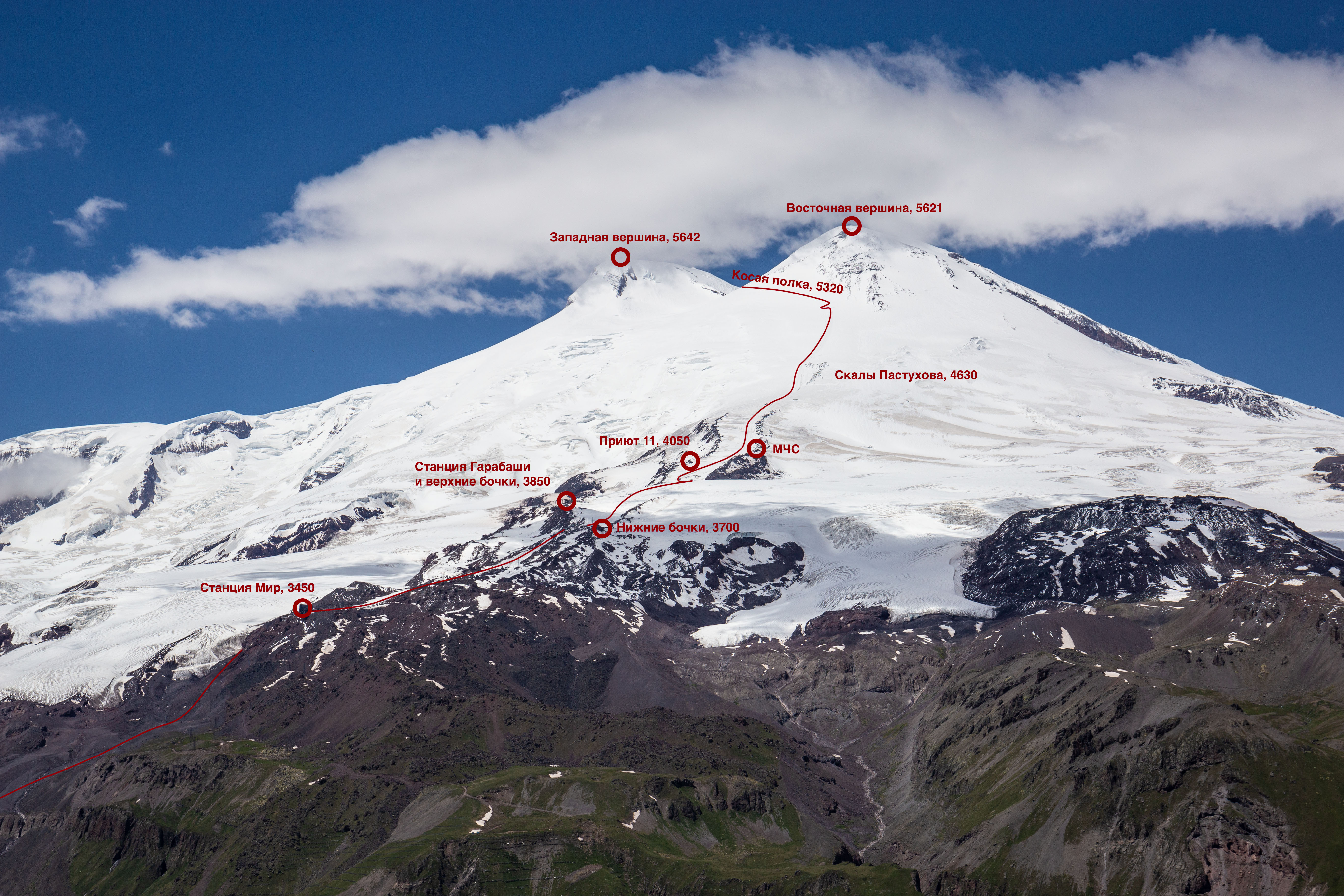 Южный маршрут восхождения на Эльбрус